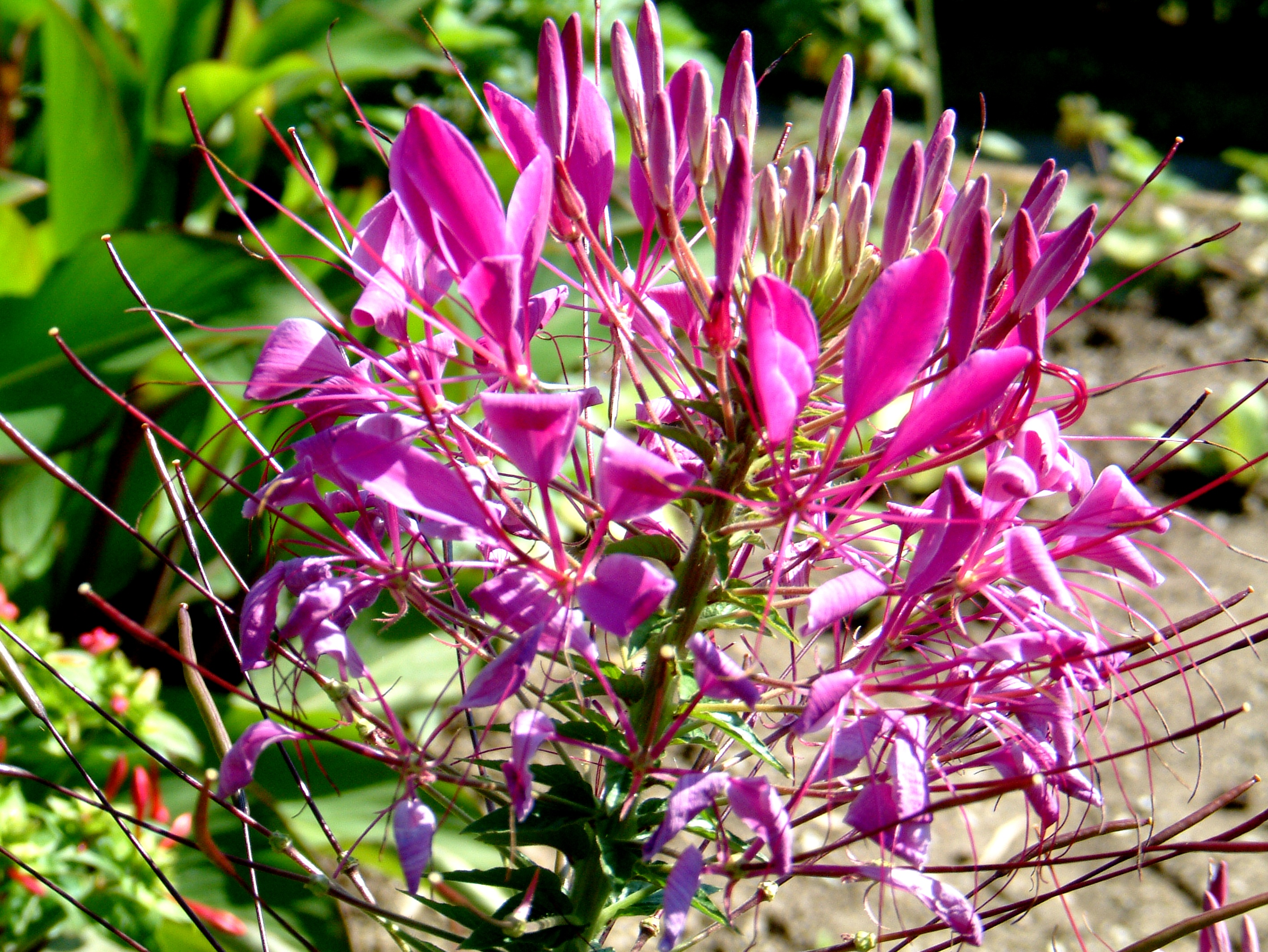 Cleome spinosa -_Spinnenpflanze_2, Grower: Mr. Vogel